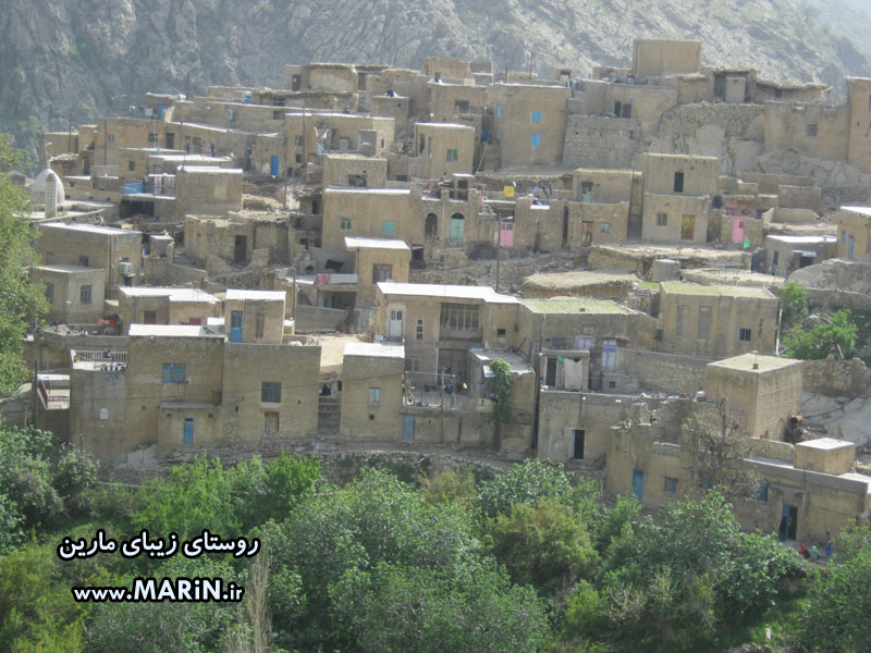 روستای زیبای مارین